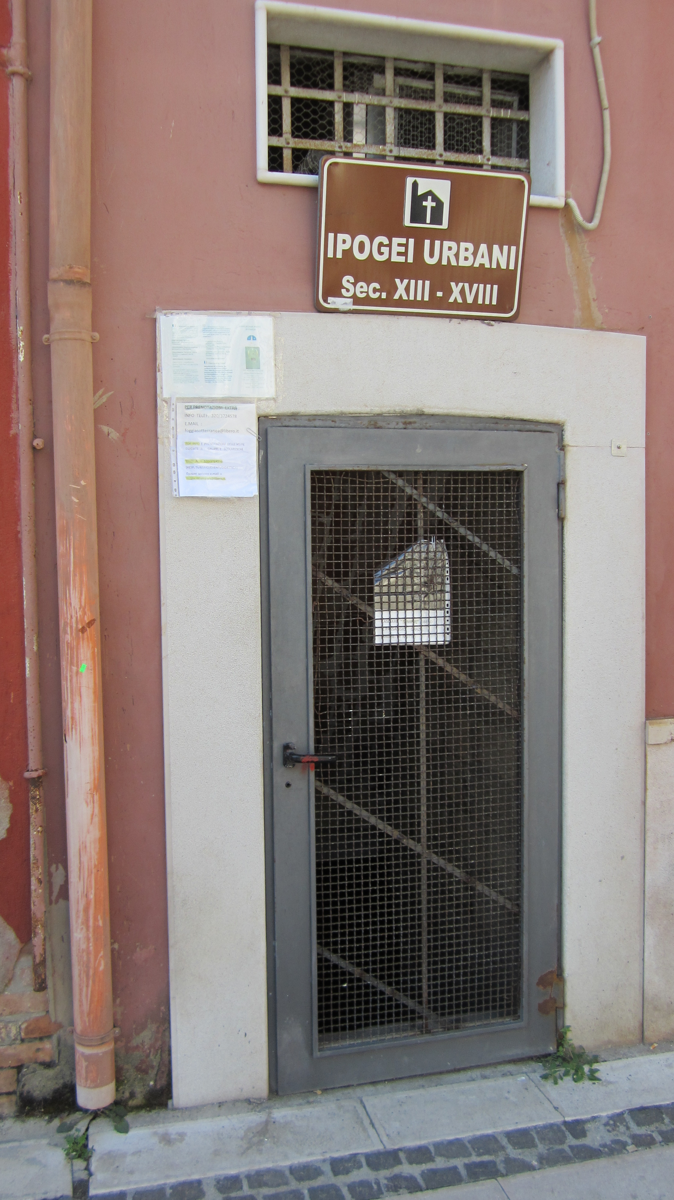 Foggia, accesso agli Ipogei